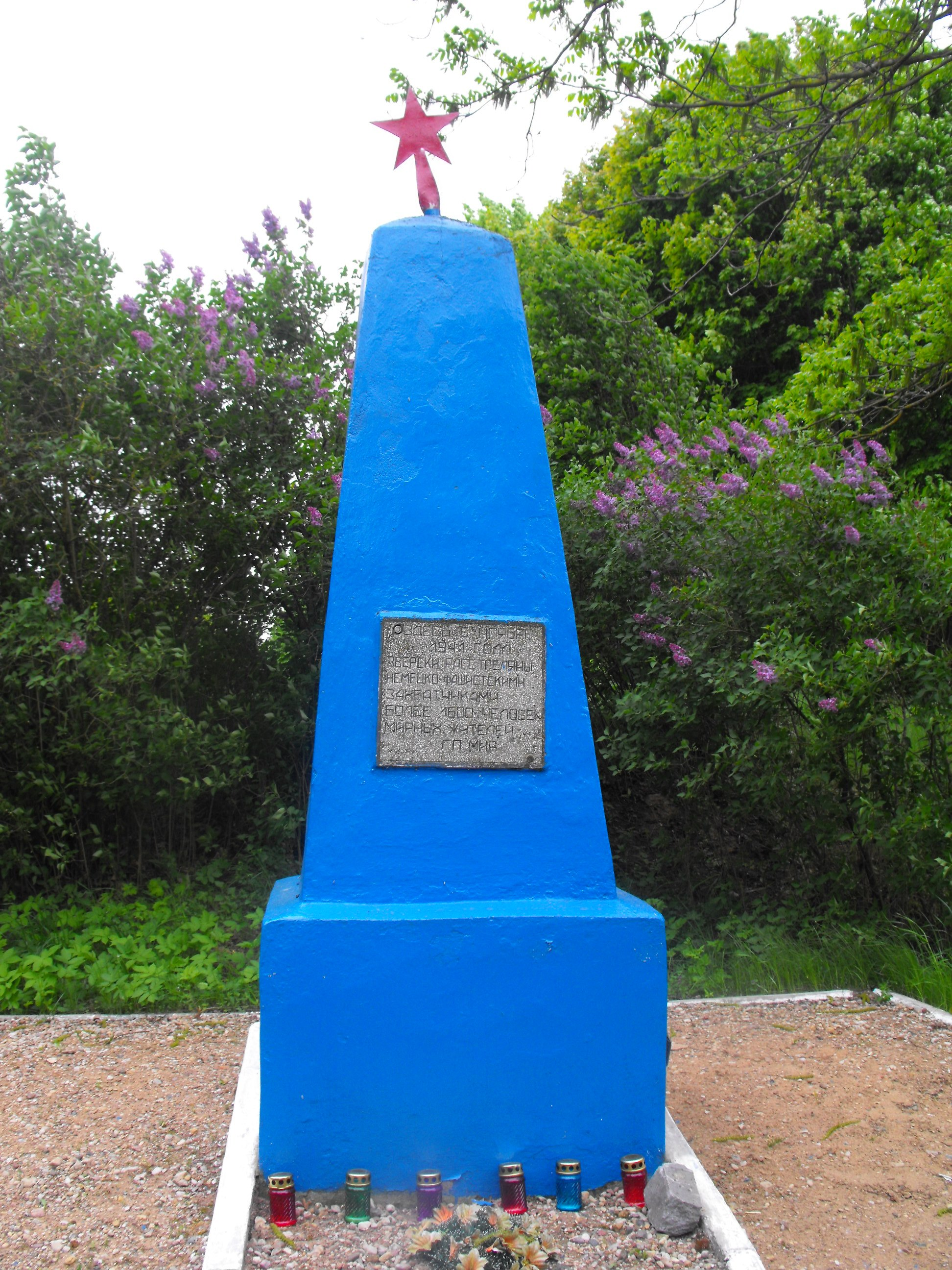 Мемориал на месте убийства нацистами 9 ноября 1941 года около 1600 евреев местечка Мир. Находится на улице Танкистов возле здания № 42 — ПТУ № 234. Установлен в 1966 году.